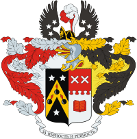 Герб рода Андреевых